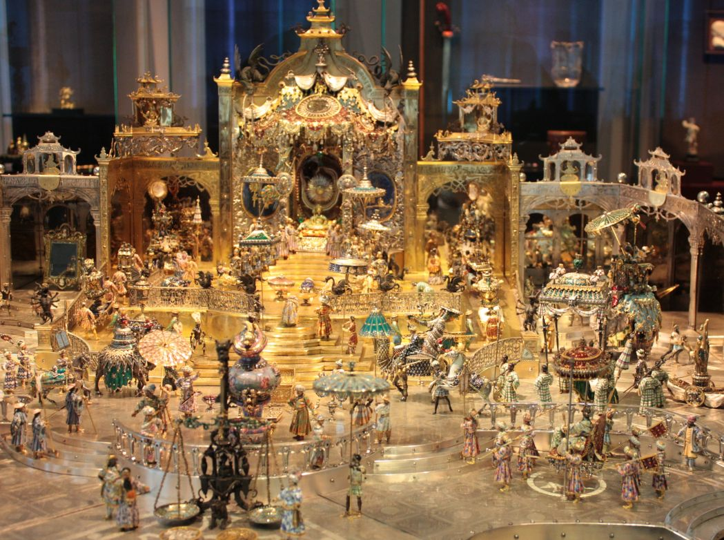 Der Thron des Großmoguls Aureng-Zeb, Johann Melchior Dinglinger, 1701-1708